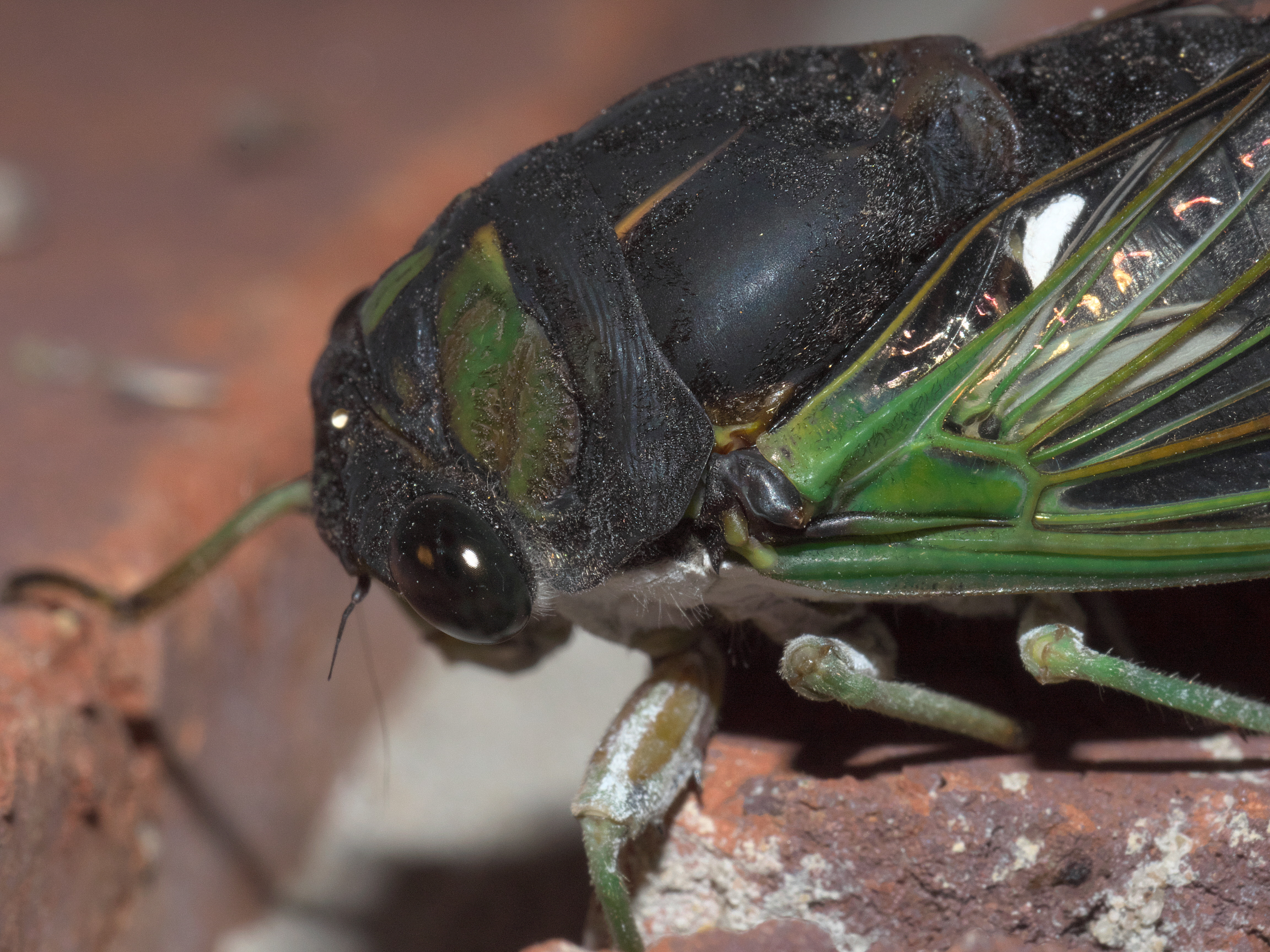 Neotibicen tibicen, swamp cicada, ID Confidence: 90